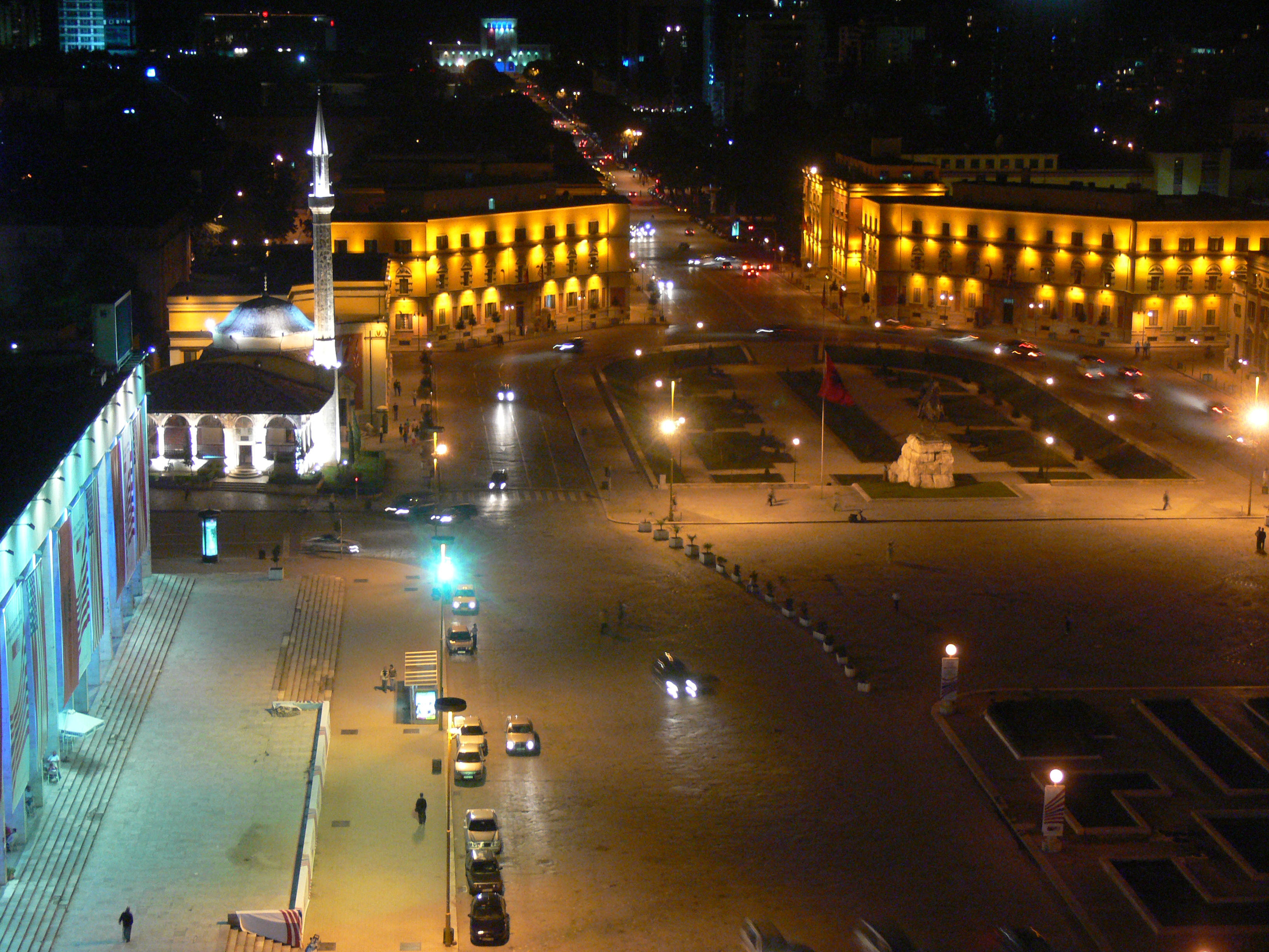 Tirana. Skanderbeg-Square (Sheshi Skenderbej) bei Nacht. Dekoration zum Bush-Besuch.